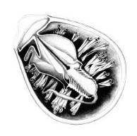 Nematocyst.png: Нематоцист, що не жалив